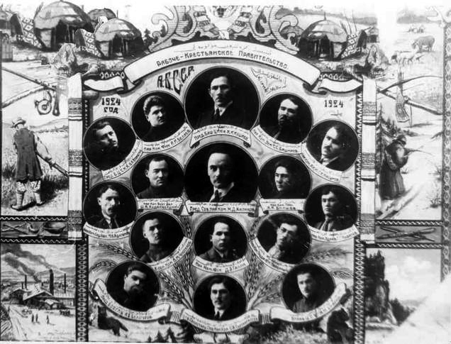 Правительство АБССР. 1924г